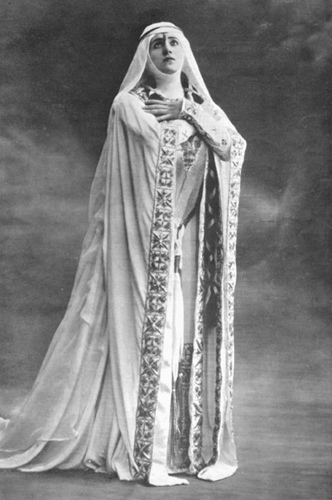 Maria Farneti (1911)